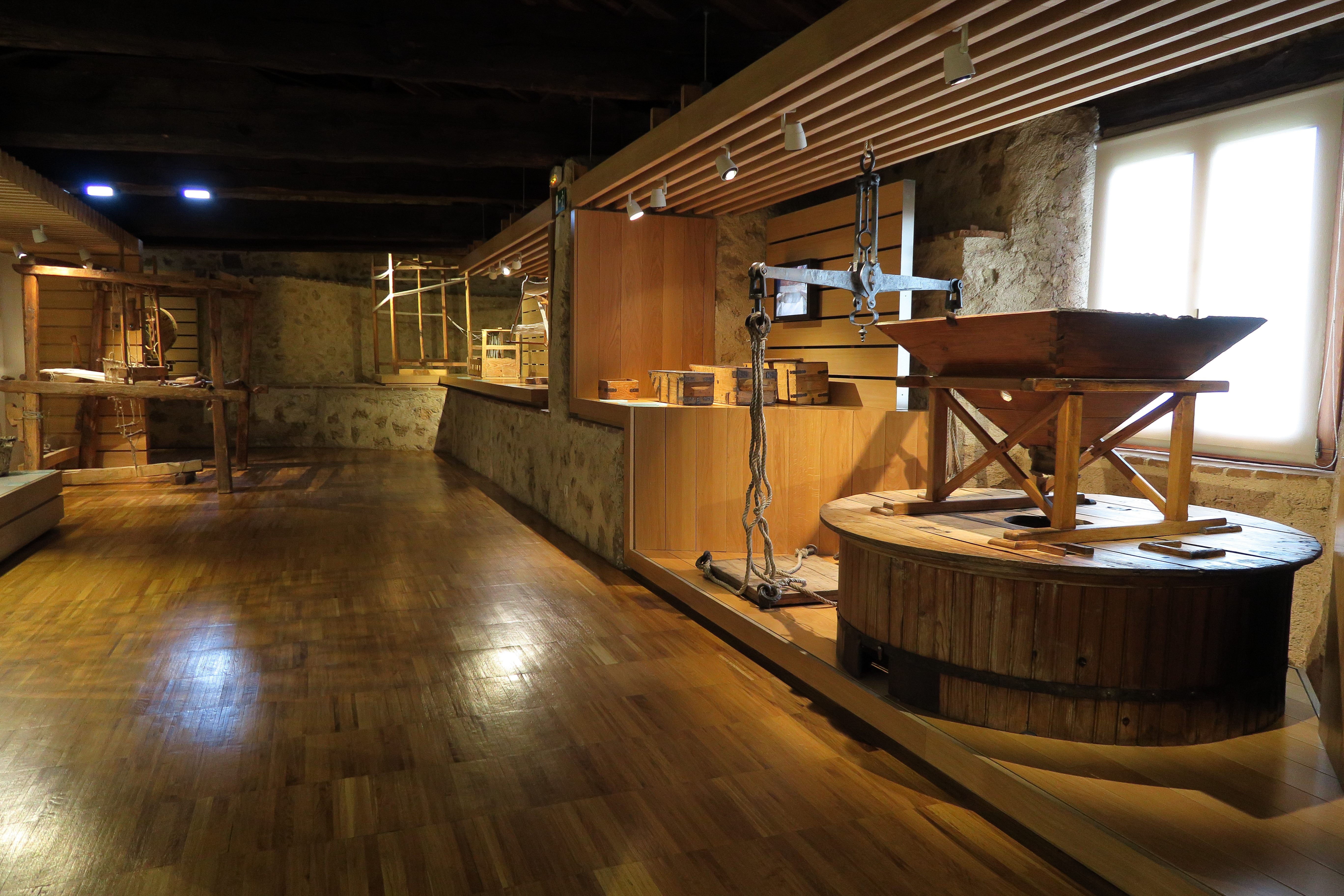 Museo de Segovia, sala la Molienda y sus Medidas